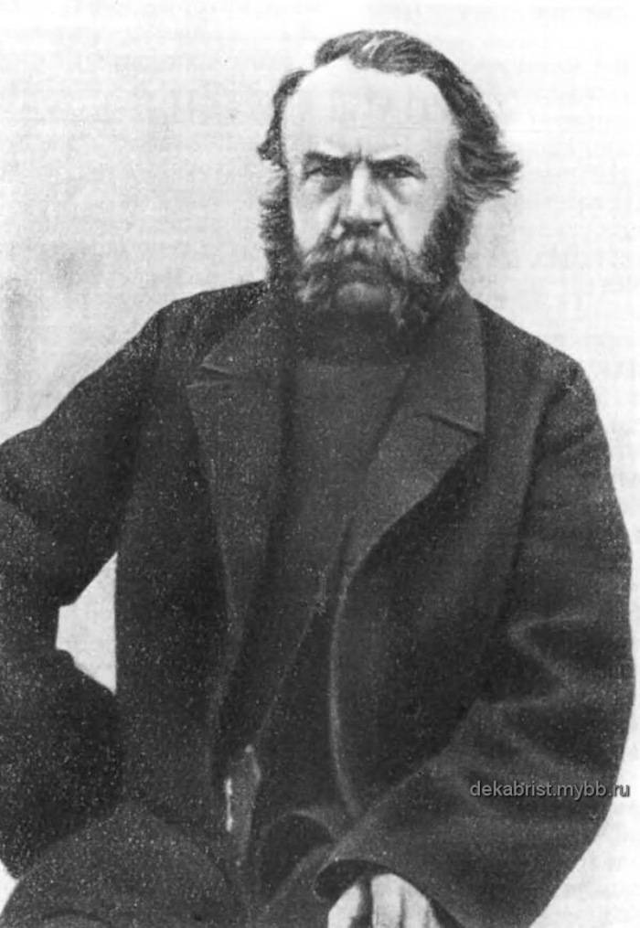 Ivan Gorbacheskiy